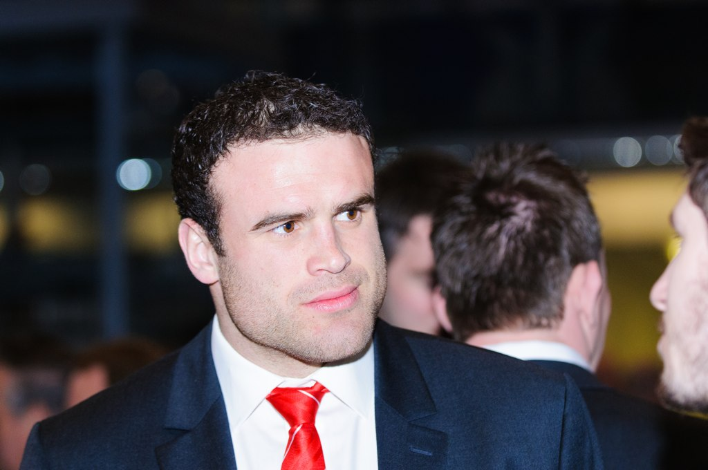 Jamie Roberts. Wales Grand Slam Celebration, Senedd 19 March 2012 / Jamie Roberts. Dathliadau Camp Lawn Cymru, Senedd 19 Mawrth 2012